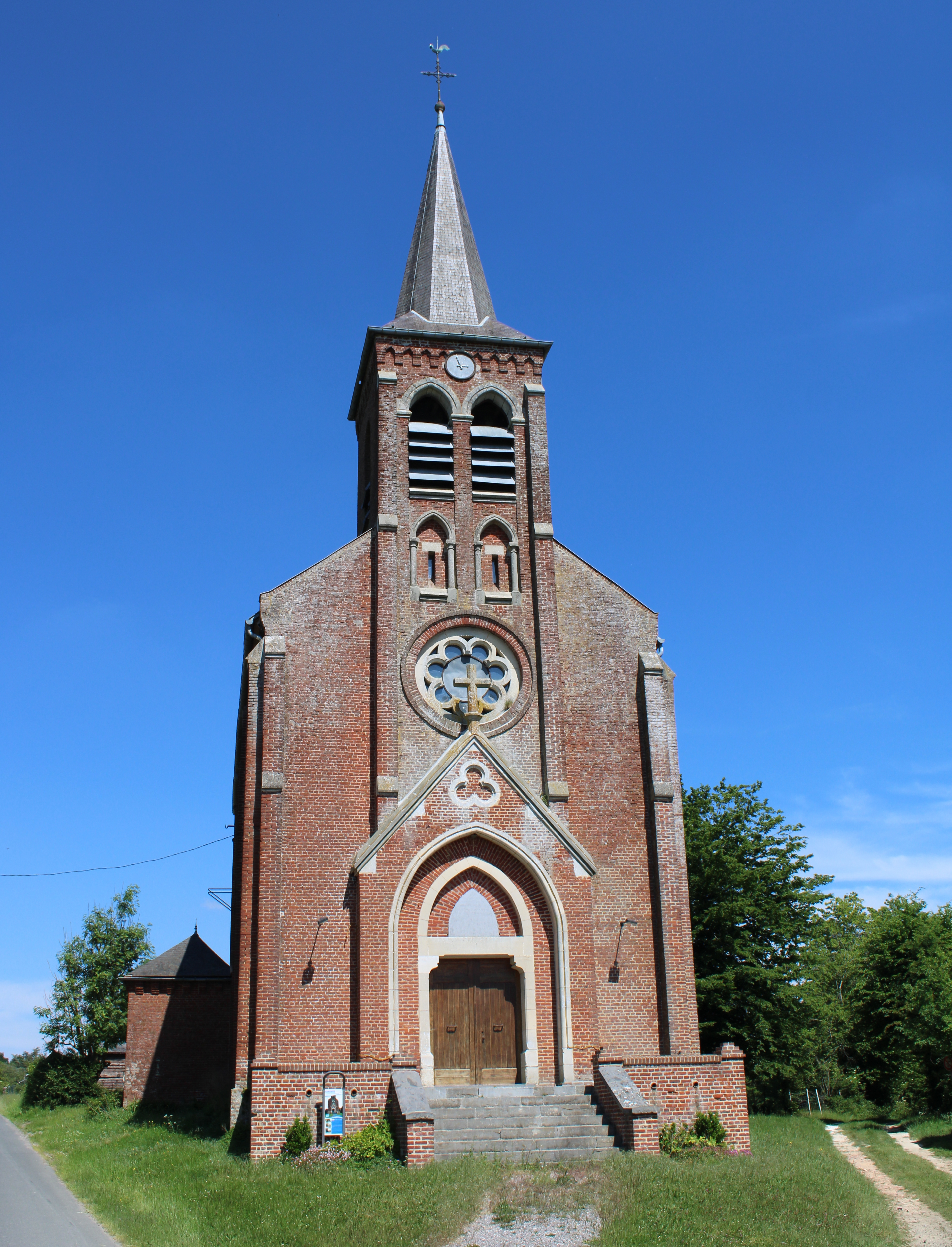 La chapelle du hameau de la Rue Lagasse.